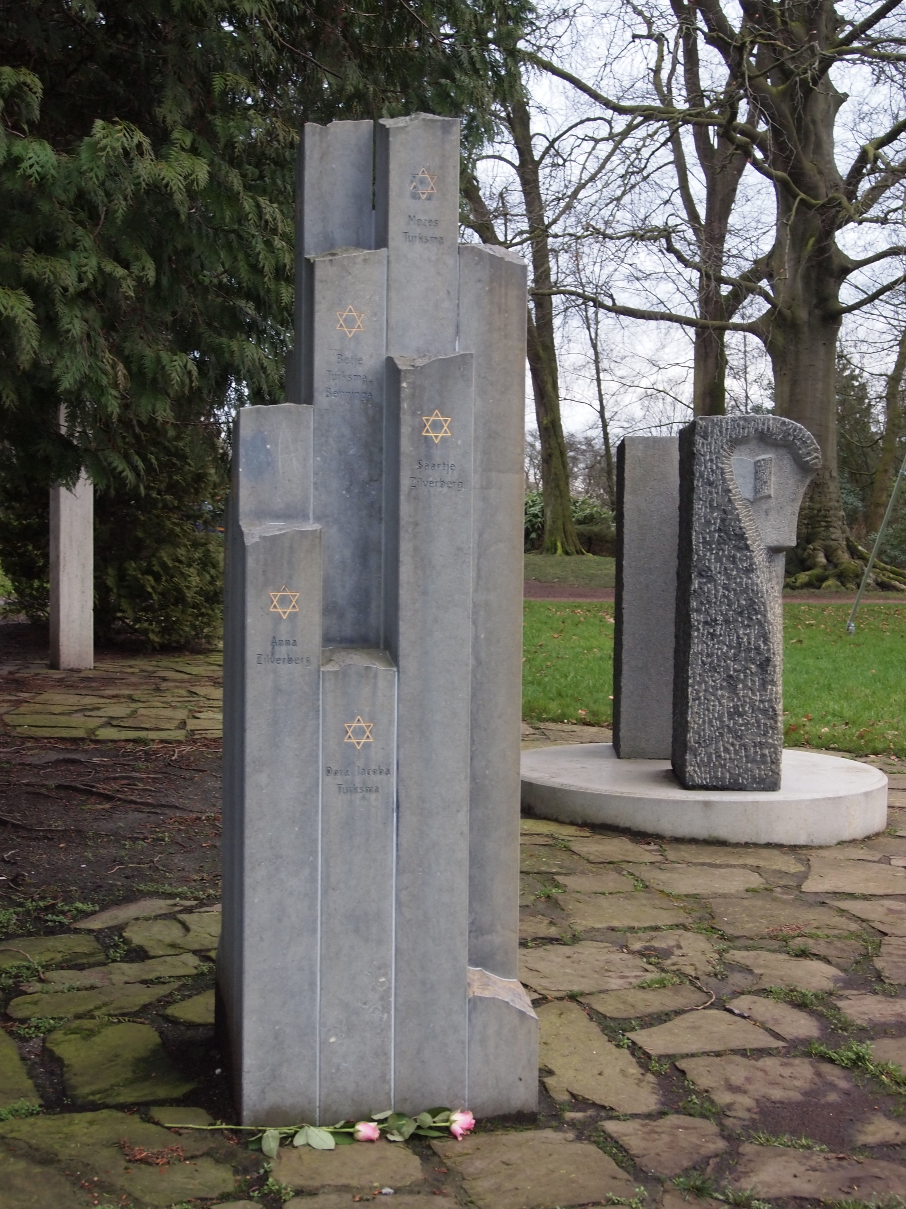 Joods en zigeuner oorlogs monument in Drachten